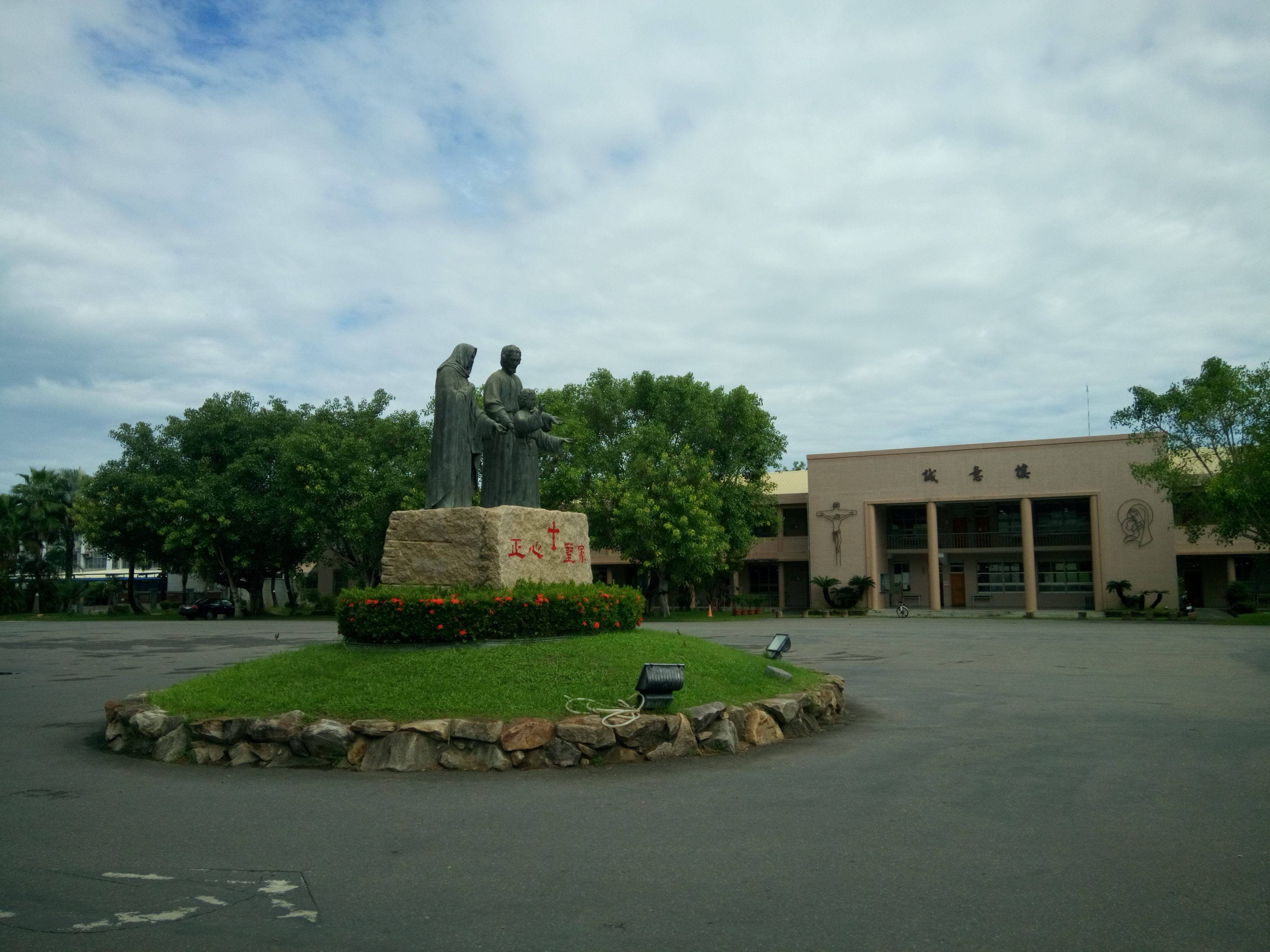 2000~至今